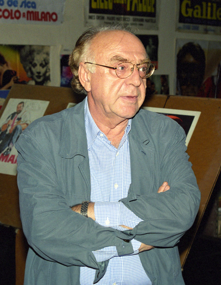 Alberto Bevilacqua al museo MICS